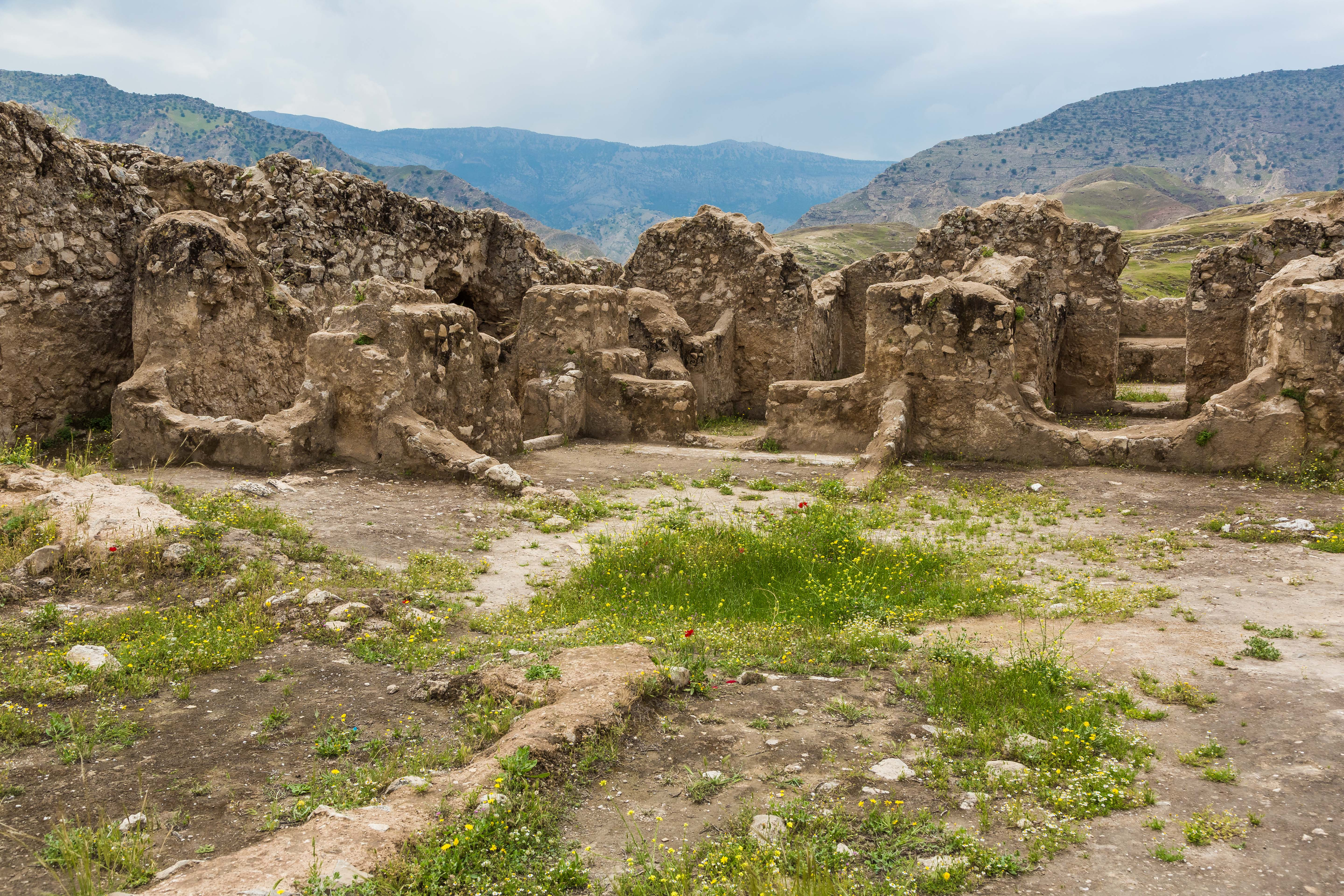 شهر تاریخی دره شهر/ سیمره